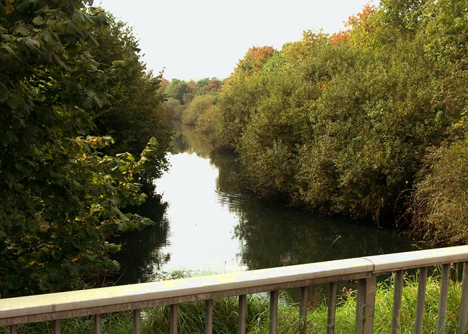 Bochum-Querenburg, Ölbach kurz vor Eintritt in Kemnader See